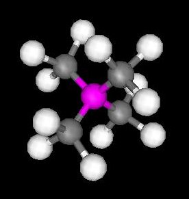 Molecola di Tetrametilsilano, lo "zero" dell'NMR. Realizzata con Ghemical, manipolata con The Gimp. GNU FDL ed. Il progetto nativo Ghemical (.gpr) è disponibile qui: it::Immagine:Tetramethylsilane TMS.gpr